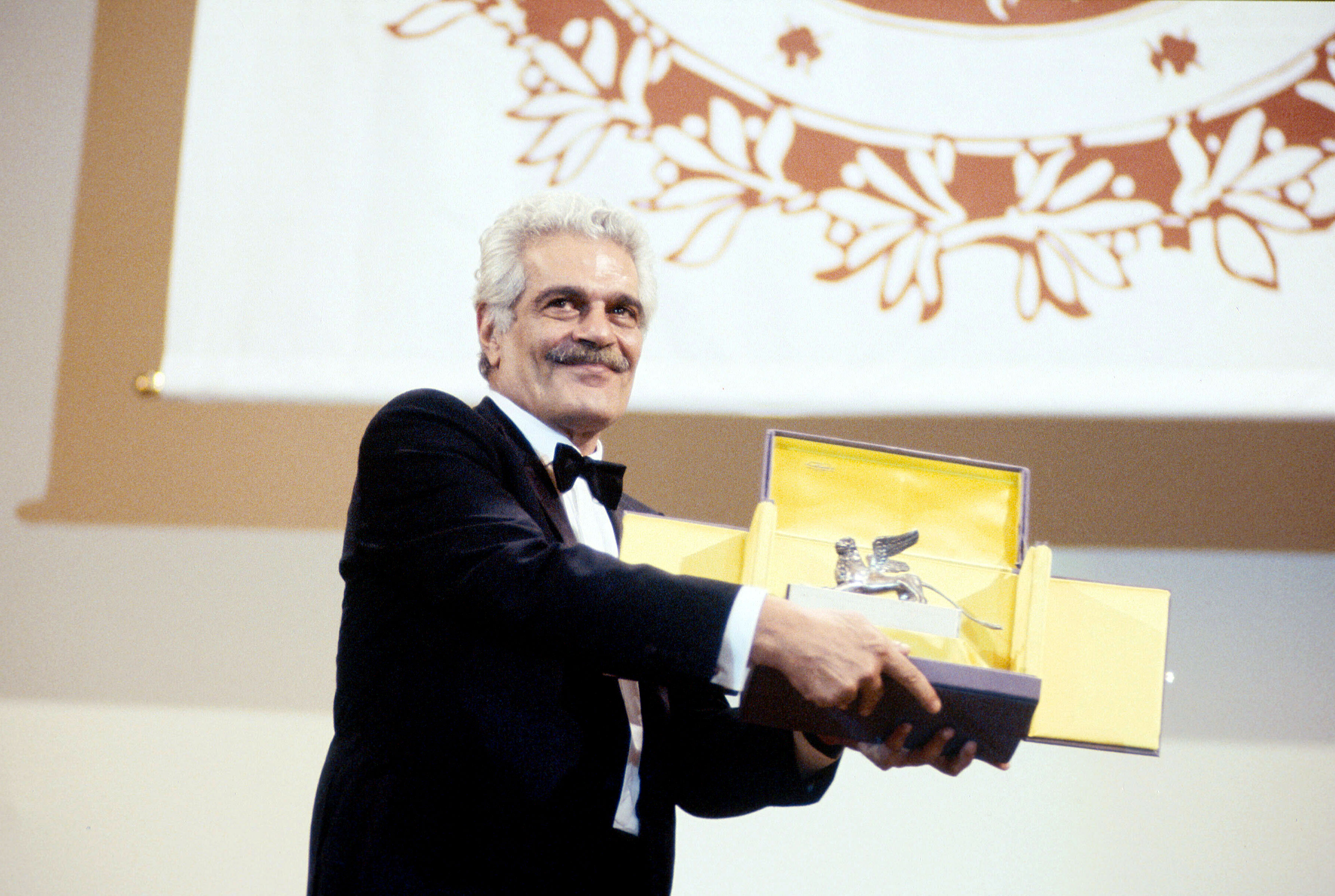 L'attore egiziano Omar Sharif riceve il Leone d'oro alla carriera alla Mostra del cinema di Venezia del 2003